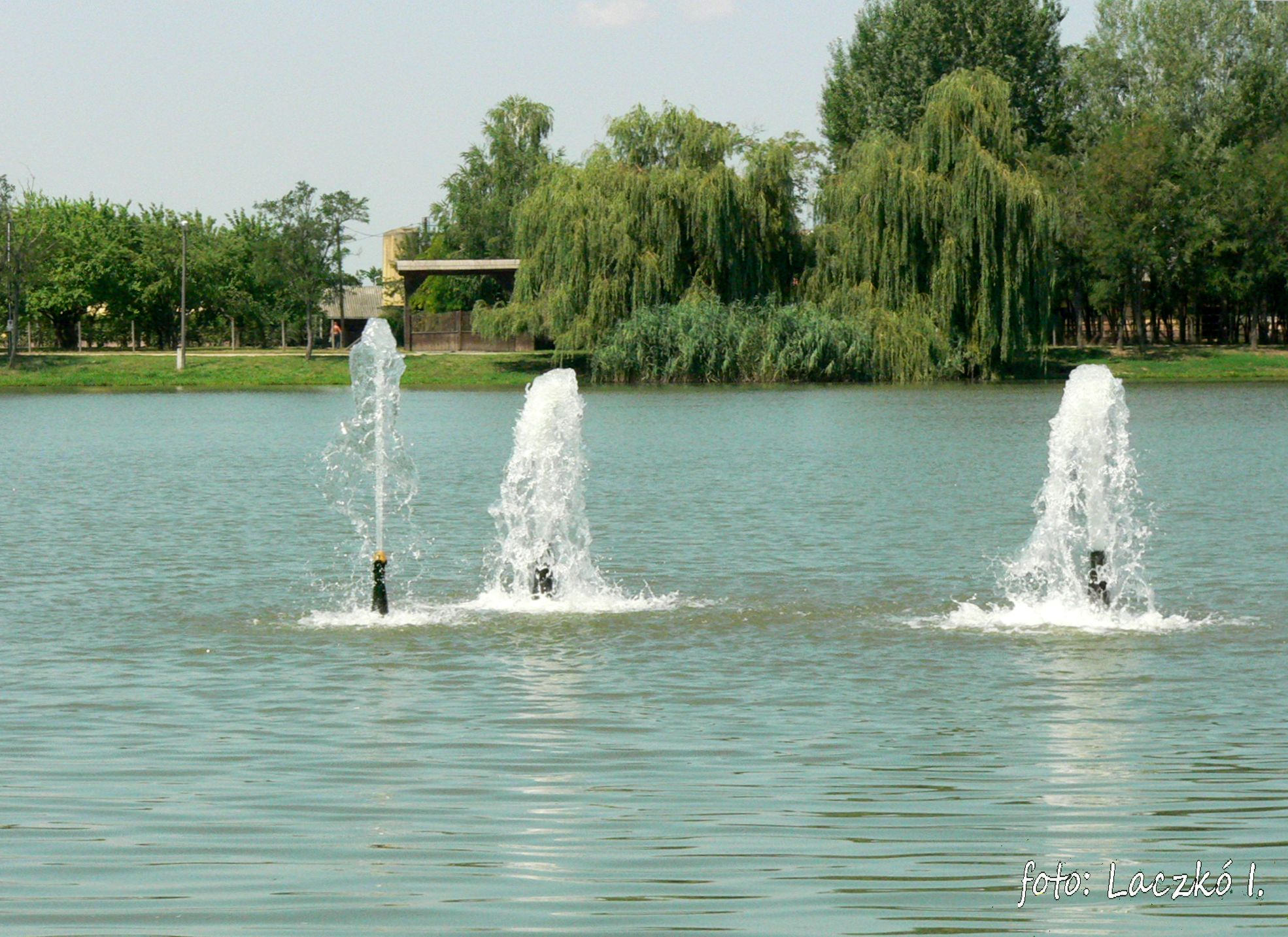 Éden-tó szökőkútjai